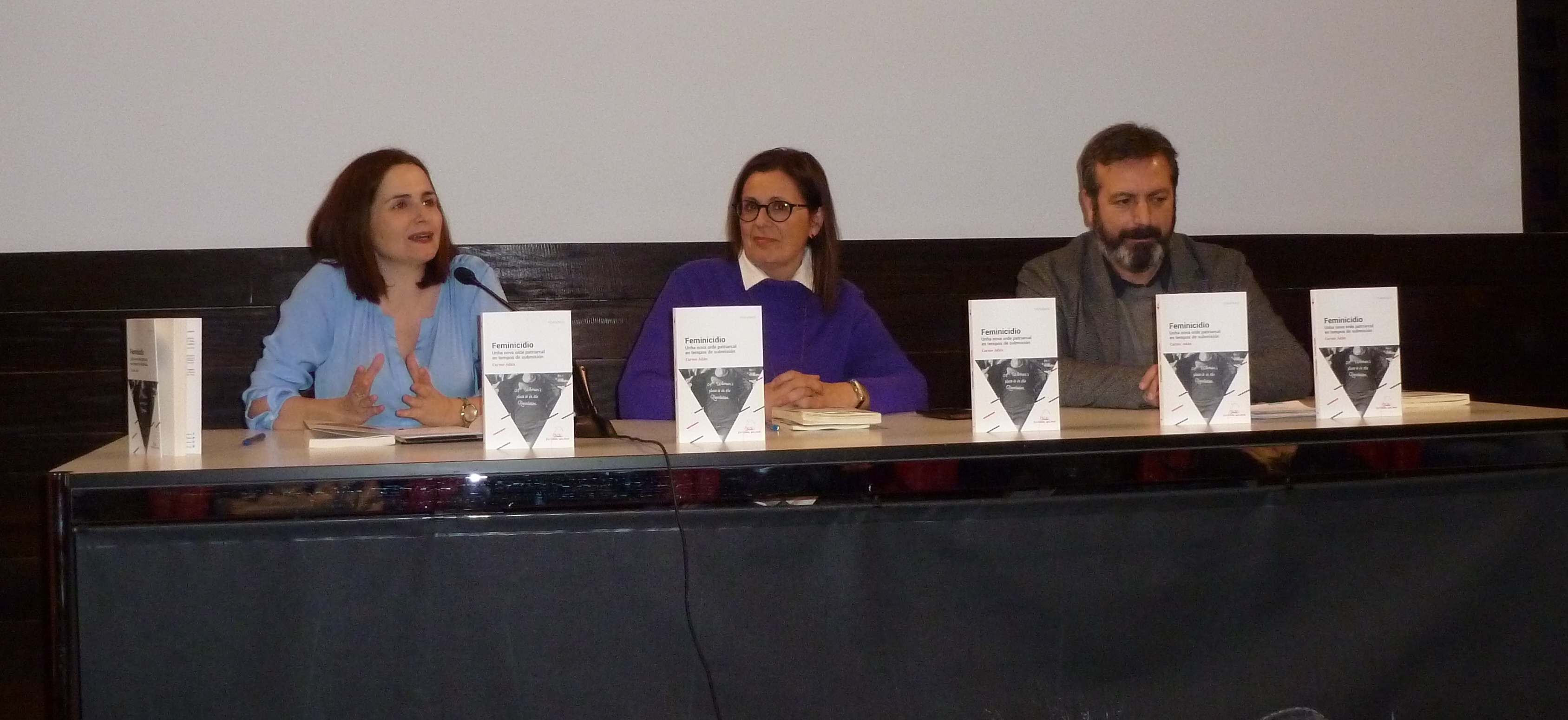 Casa das Campás de Pontevedra, 31/01/2019. Presentación de "Feminicidio" (Ed. Galaxia) de Carme Adán, con Malores Villanueva e Luís Bará